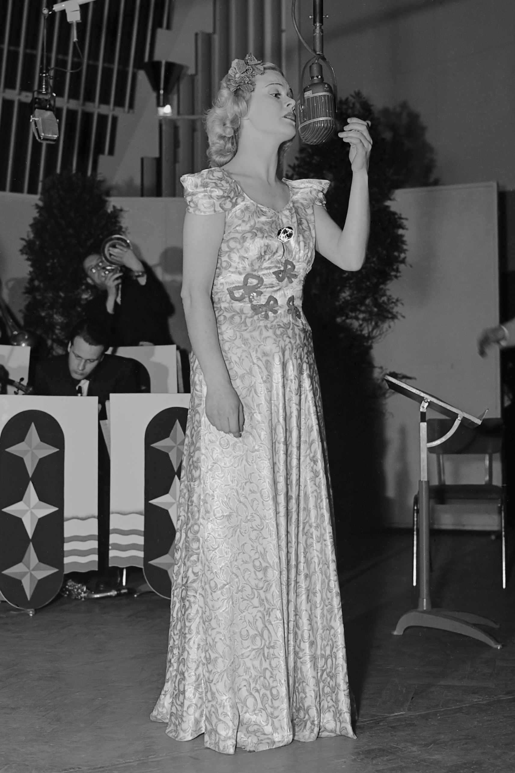 De bonte dinsdagavondtrein, Annie de Reuver 23 januari 1946